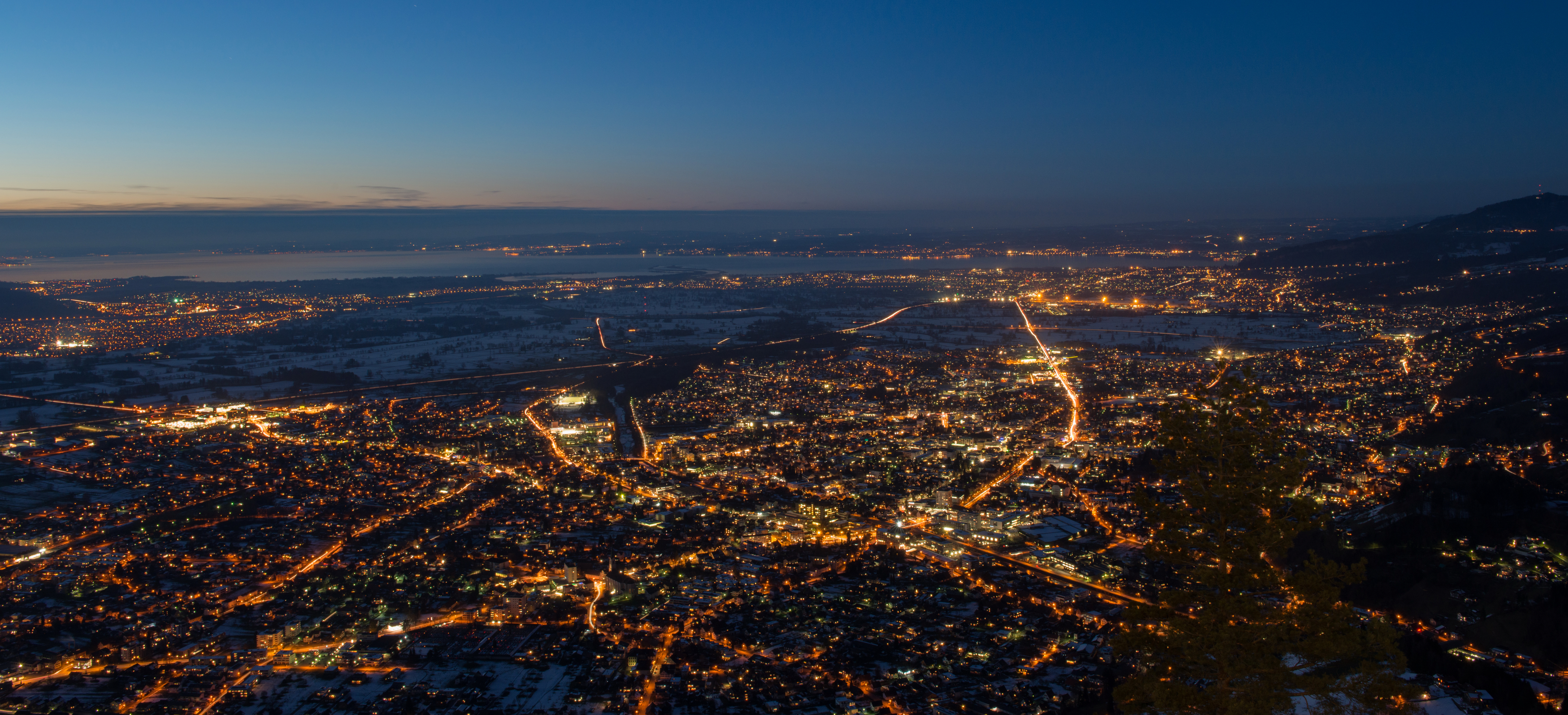 Panorama von der Bergstation Karrenseilbahn mit Blick ins untere Rheintal auf den Bodensee sowie die Städte Dornbirn und Bregenz.